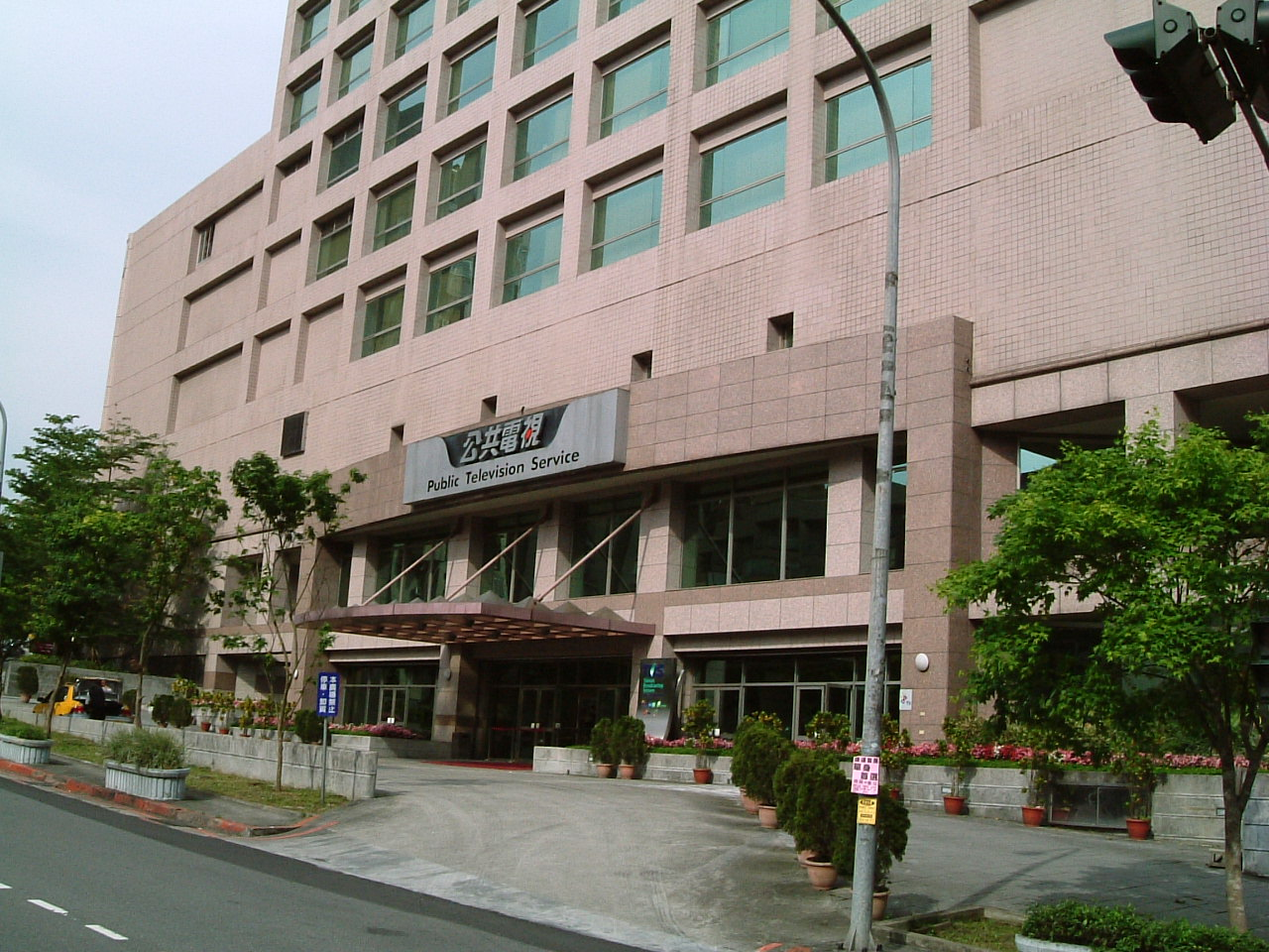 公共電視文化事業基金會A棟大樓大門右方外觀。